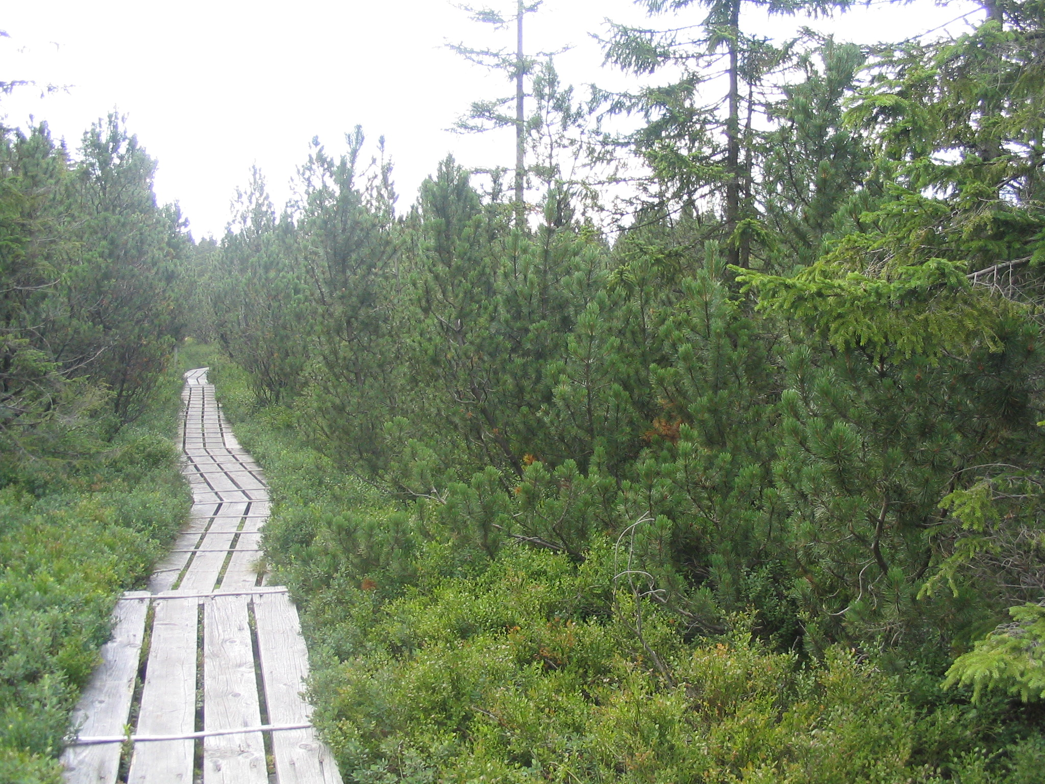 Latschenfilz im Nationalpark Bayerischer Wald, aufgenommen von Dr. Hagen Graebner am 31.07.2007